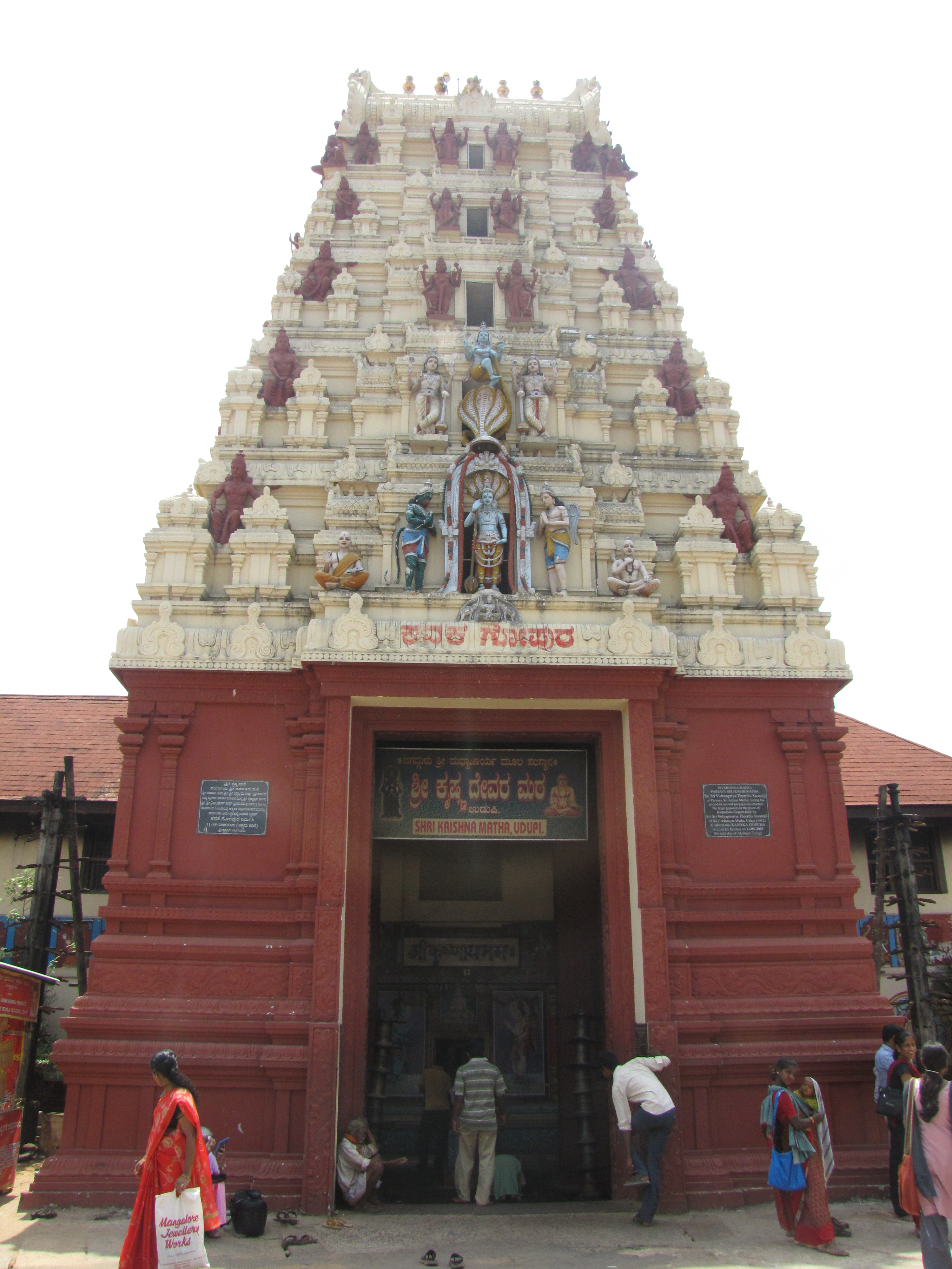 Krishna Math Gopura, Udupi